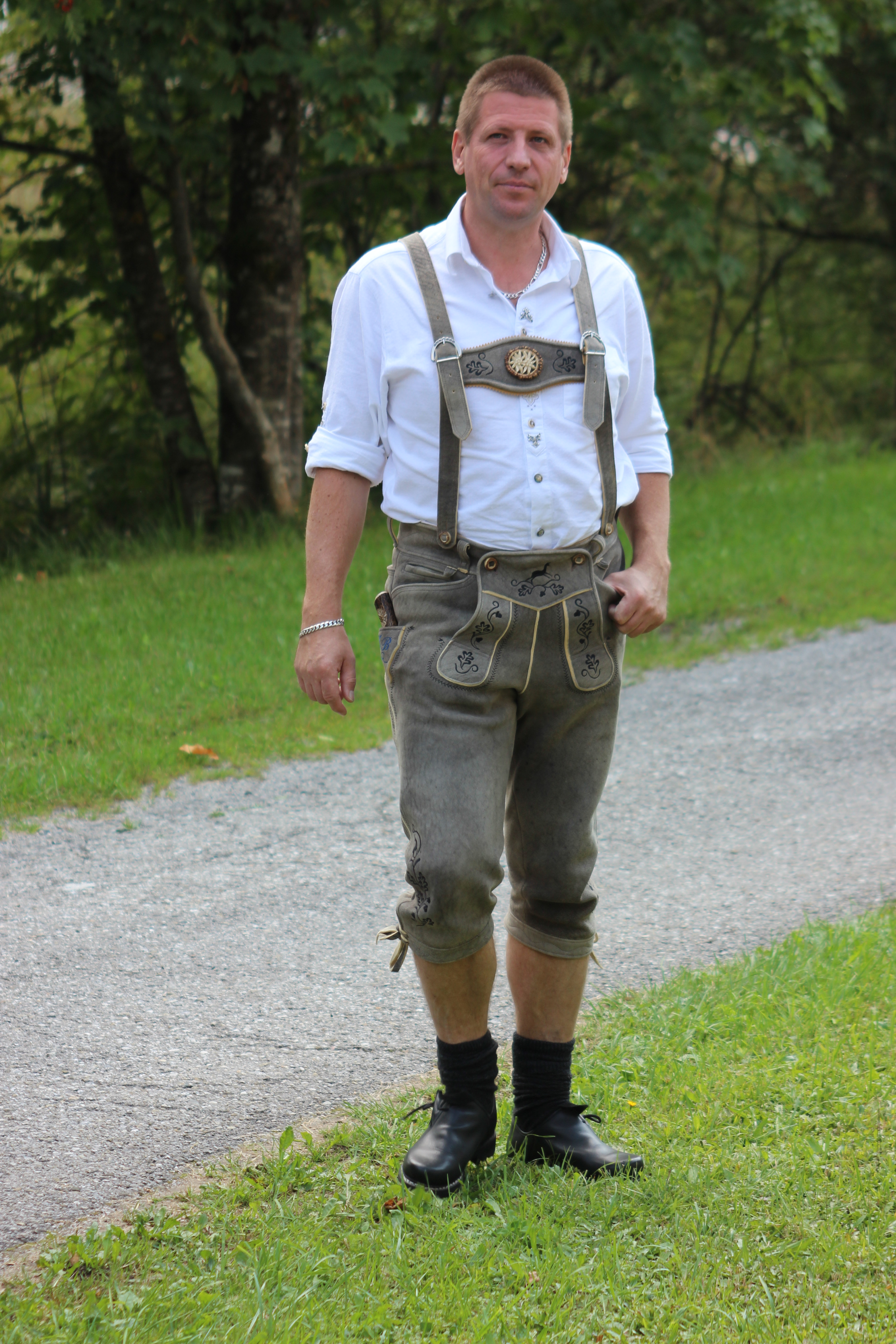 Mann in Trachtenlederhose und - Hemd.